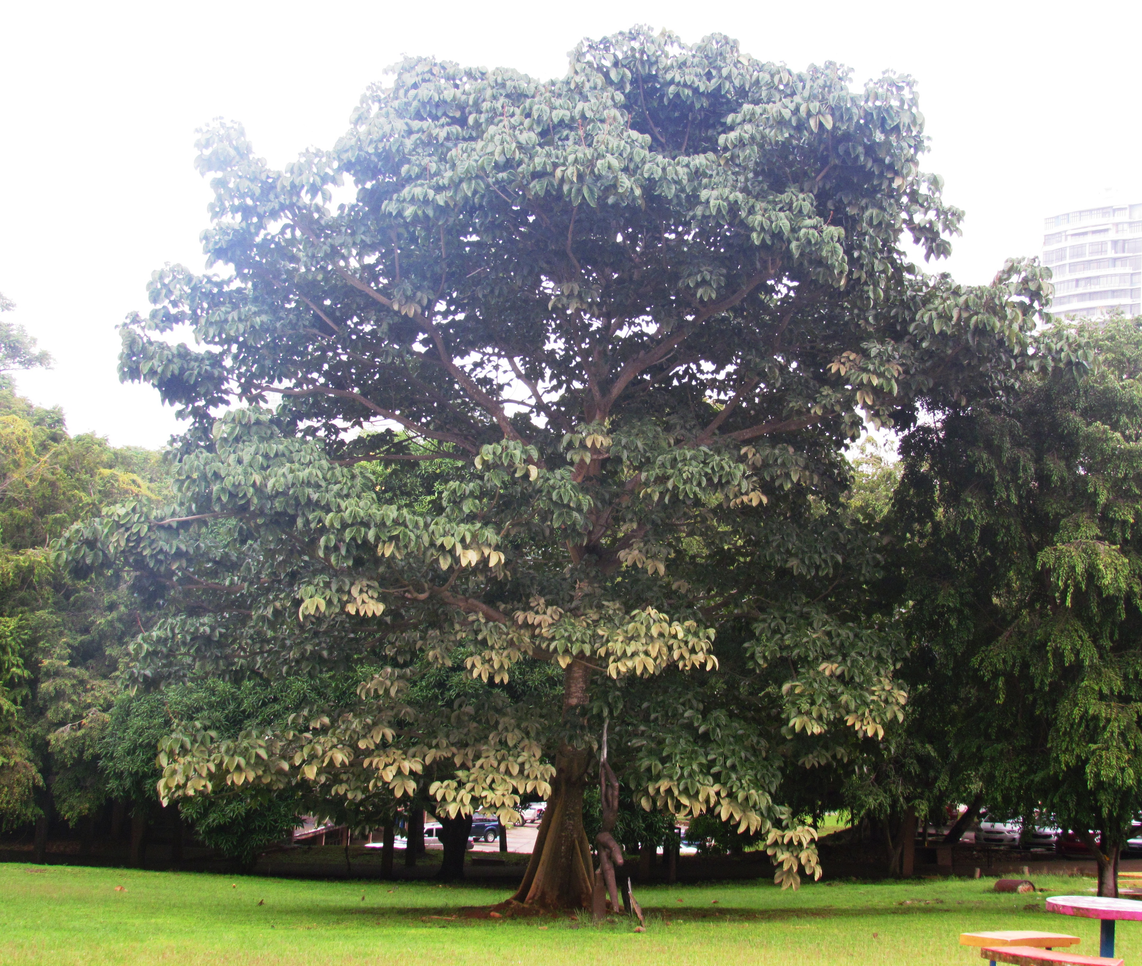 El árbol nacional de Panamá, Sterculia apetala, es un árbol caducifolio, que puede alcanzar una altura entre 35 y 45 metros. Este ejemplar de la foto tiene una edad aproximada de 8 años.